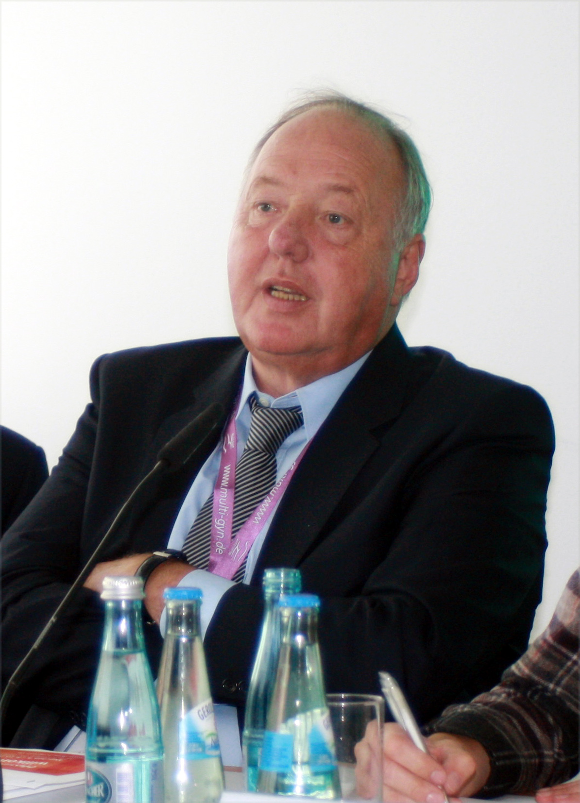 Rolf Kreienberg, Gynäkologe und Geburtshelfer am 5. Oktober 2010 in München